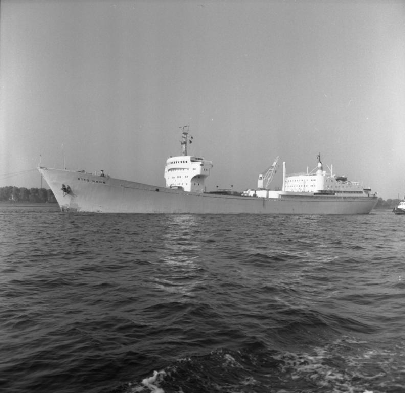 Atomschiff "Otto Hahn" im Hamburger Hafen